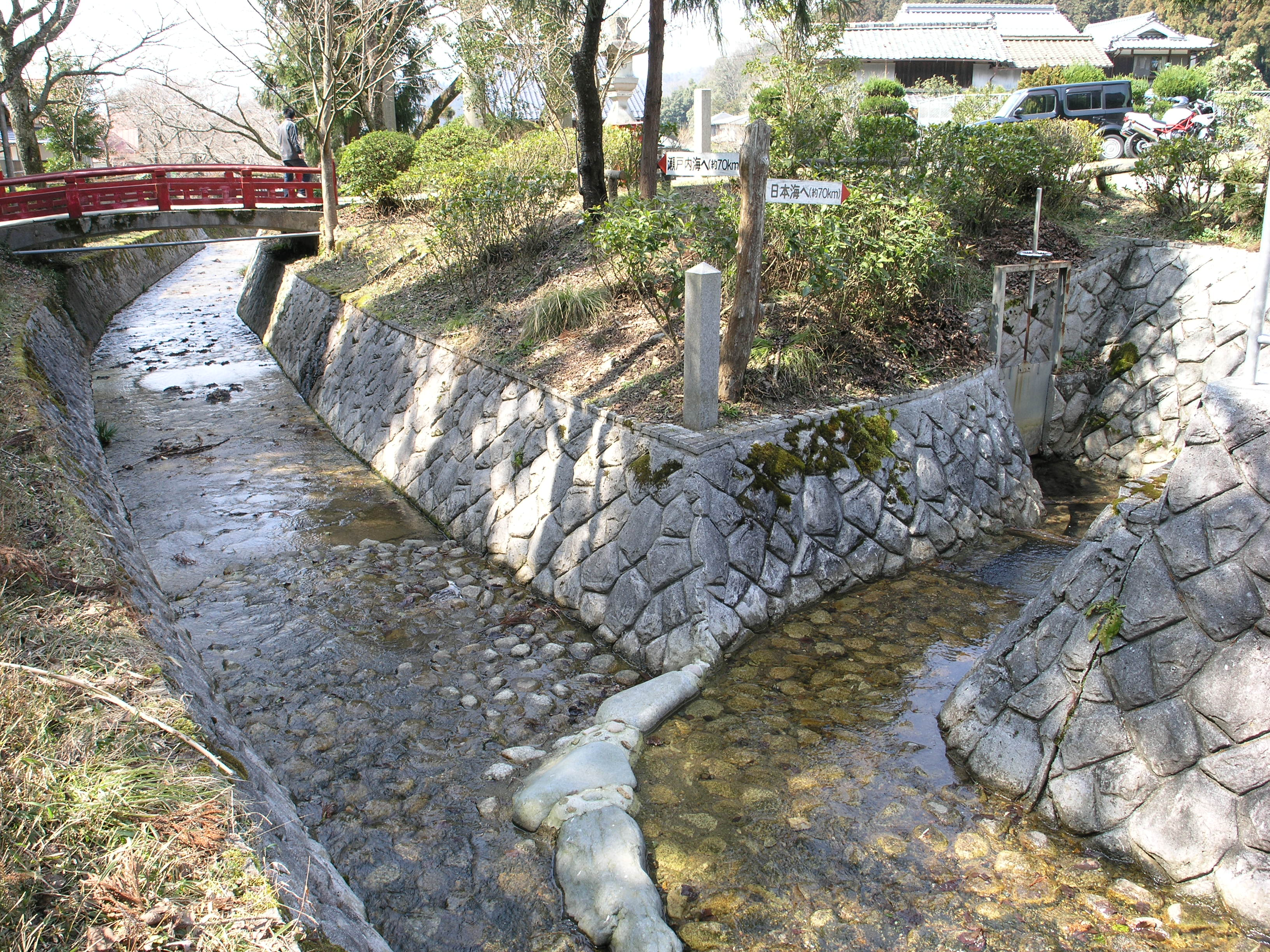 Miwakare Park in Tamba, Hyōgo, Japan